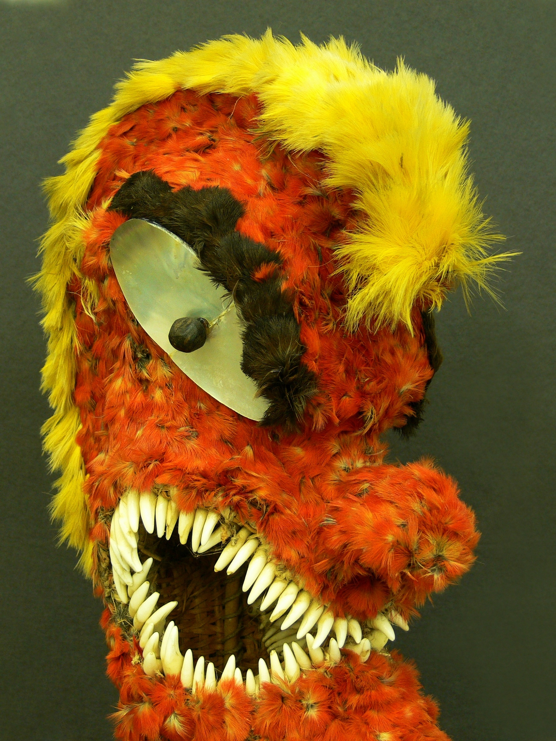 Kuka'ilimoku oder einfach Ku, Federskulptur des hawaiianischen Kriegsgottes aus dem 18. Jahrhundert, Exponat aus der Göttinger Cook/Forster-Sammlung des Instituts für Ethnologie der Georg-August-Universität